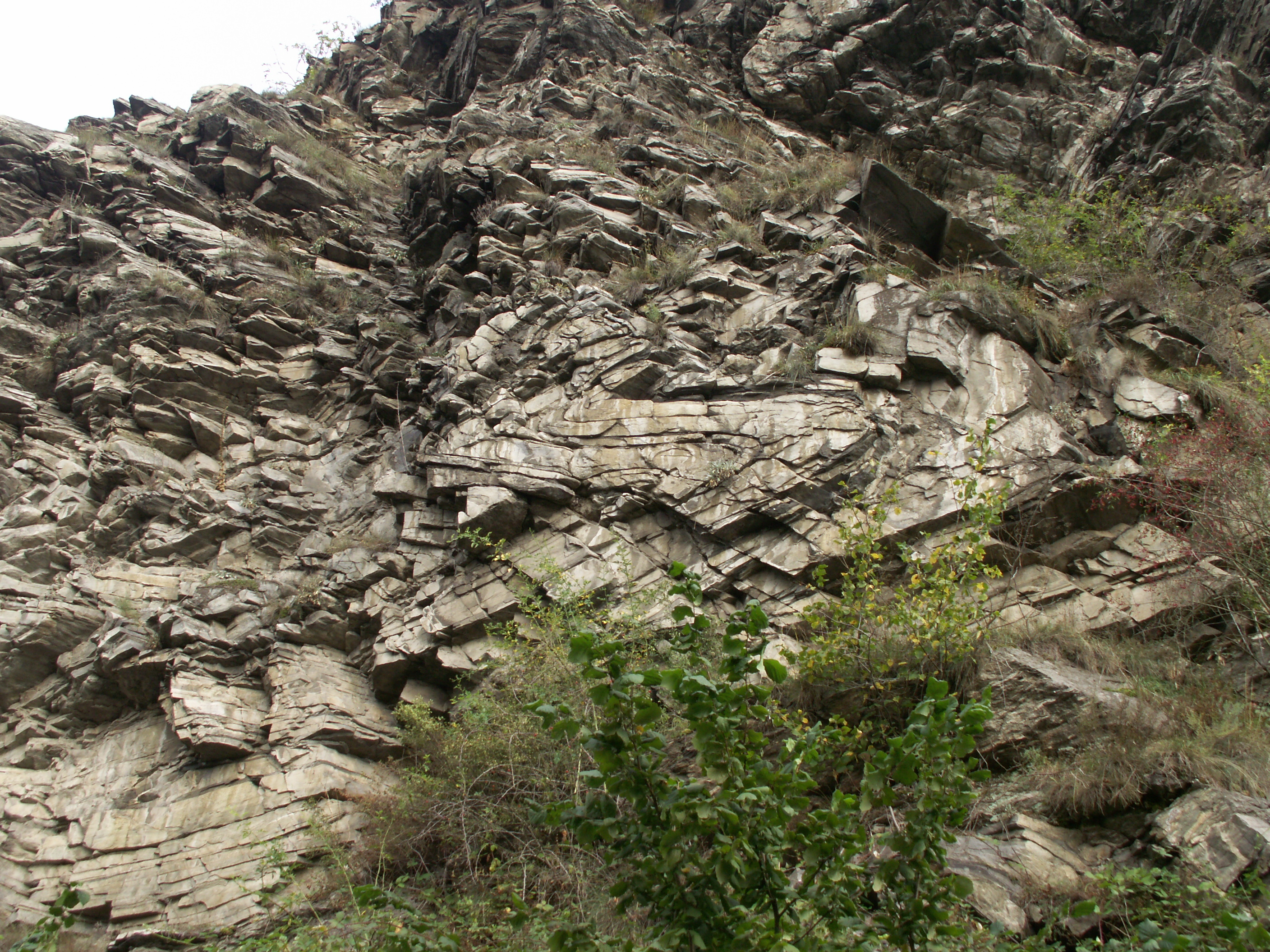 vrásy v bítešských ortorulách, Zadní Hamry, obec Vranov nad Dyjí, okres Znojmo